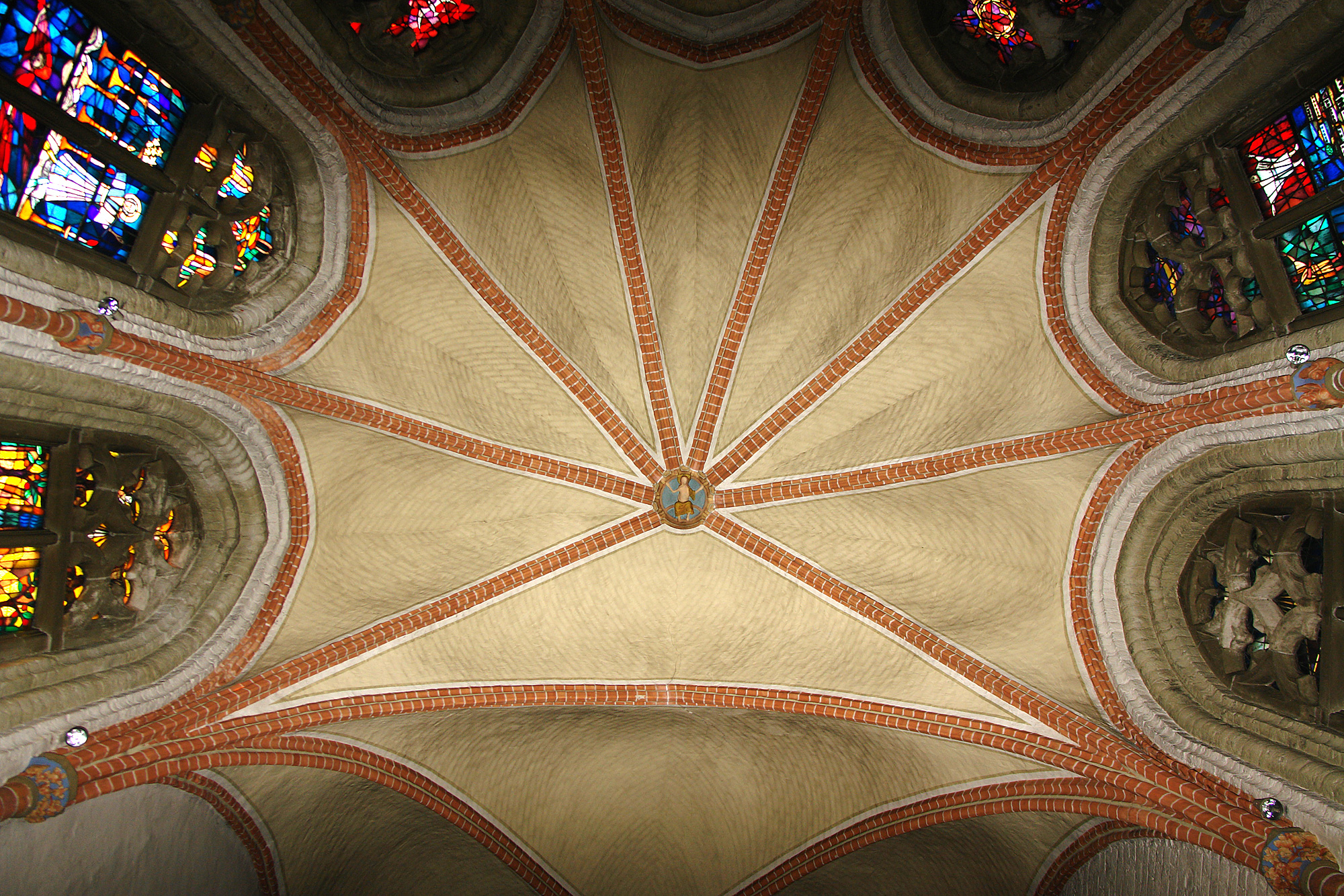 St.Martini-Kirche in Bremen. Gewölbe im Chor mit dem segnenden Christus